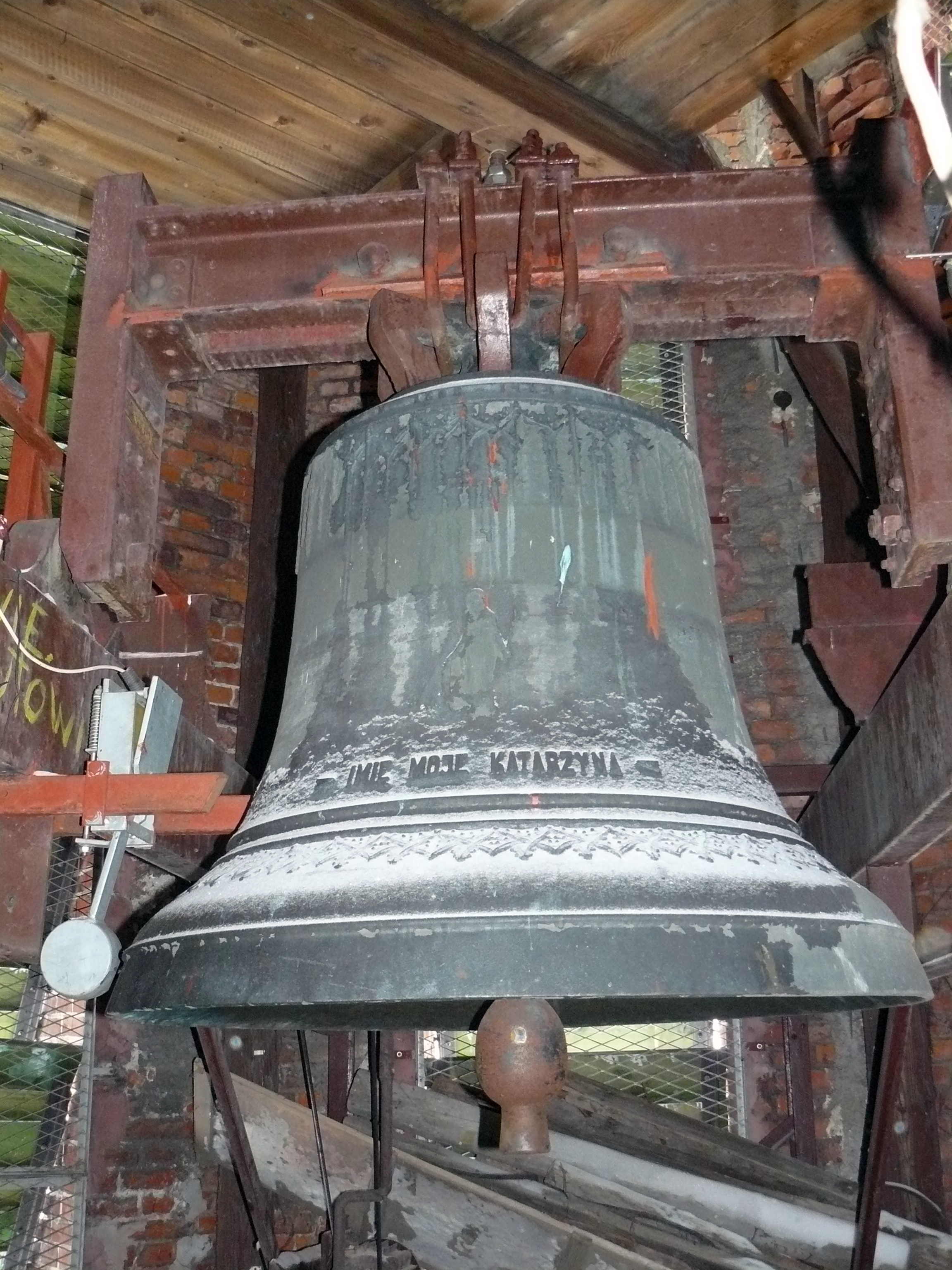 „Katarzyna”, dzwon nazwany imieniem Św. Katarzyny Aleksandryjskiej patronki kościoła w Grybowie